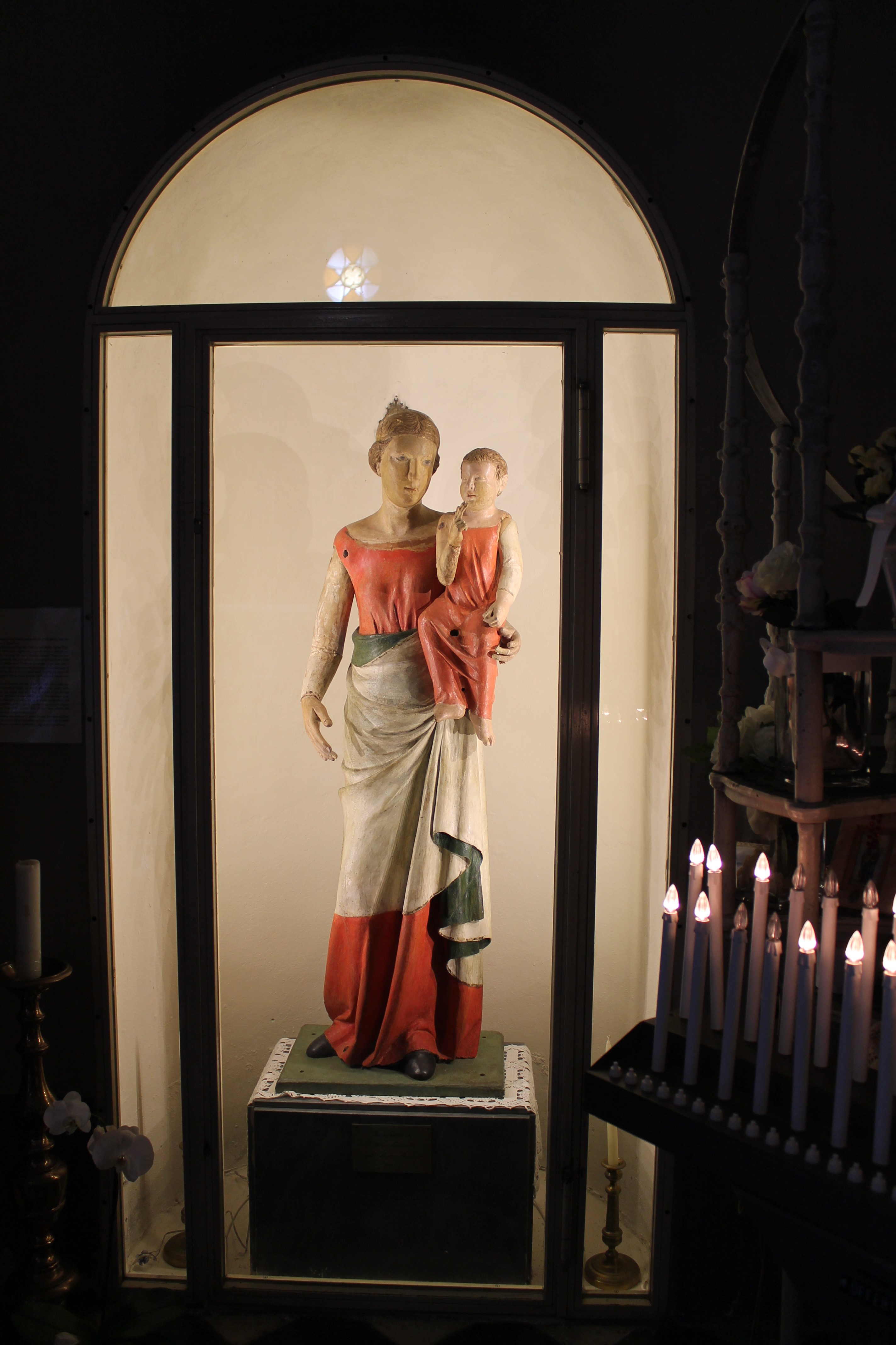 Statua lignea della Madonna di [Rupecava , opera di , conserivata all'interno della Chiesa di San Bartolomeo Apostolo a [Ripafratta]